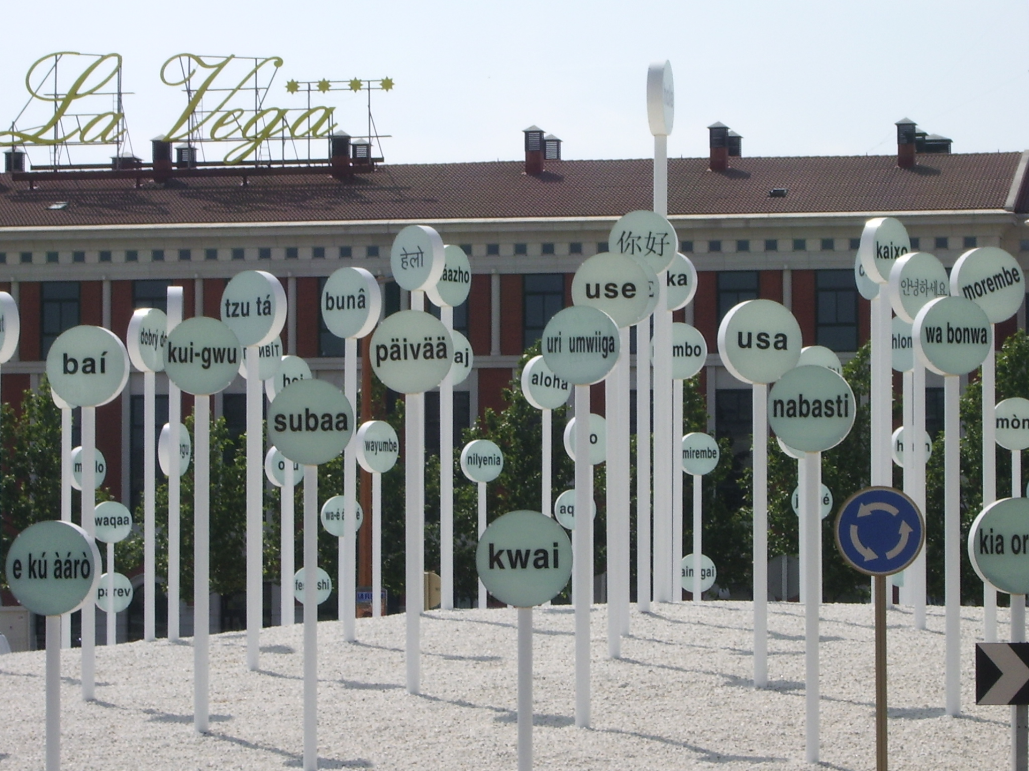 "Hola" y mas "hola"